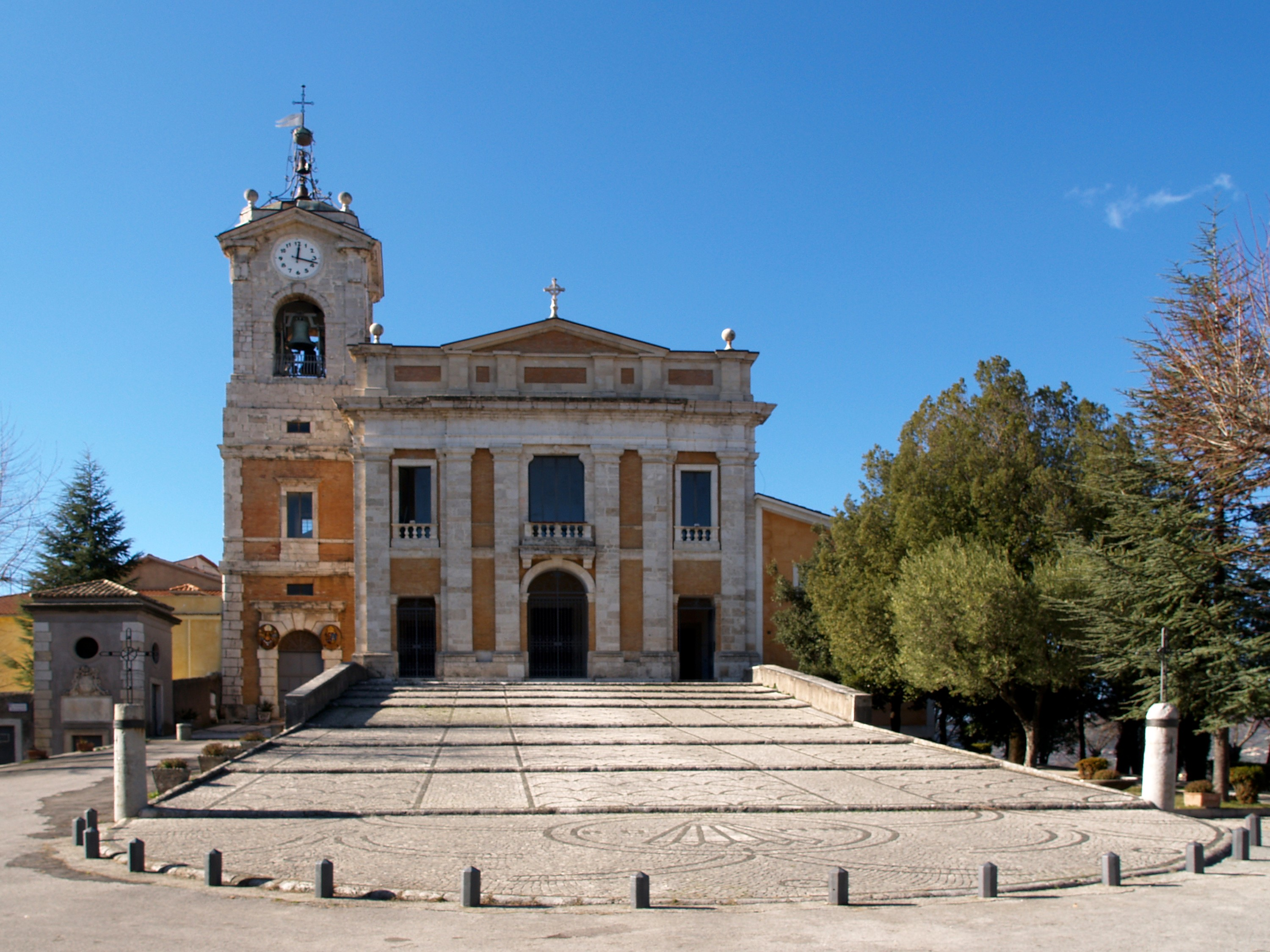 Cattedrale